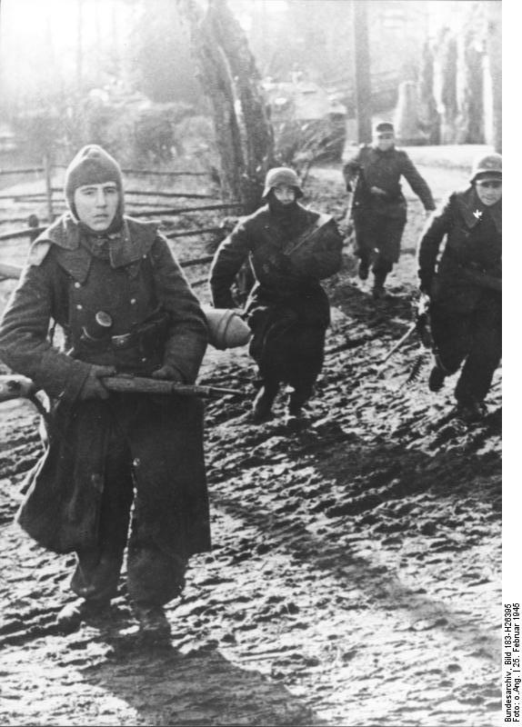 Schlesien, Grenadiere im Abwehrkampf Zentralbild II.Weltkrieg 1939-1945 Grenadiere und Panzer der faschistischen deutschen Wehrmacht in schweren Abwehrkämpfen gegen die vordringende Sowjetarmee in Cunzendorf (Schlesien) zwischen Kesselsdorf und Hohenfriedeberg am 25.2.1945.